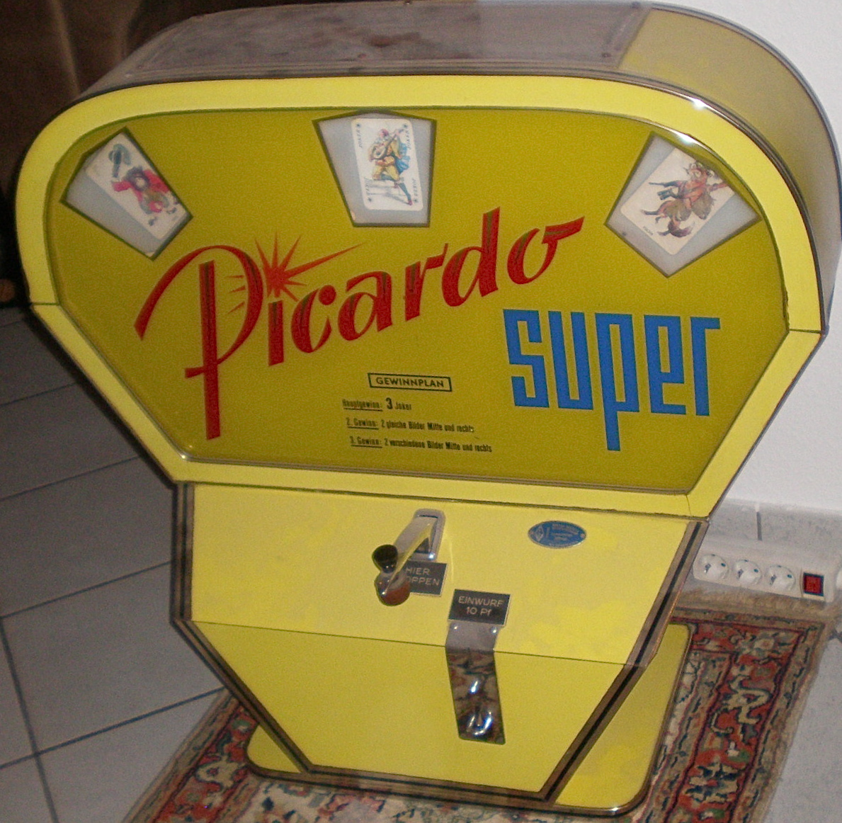 Das Paradepferd der Firma Viktor Müller Apparadebau Solingen